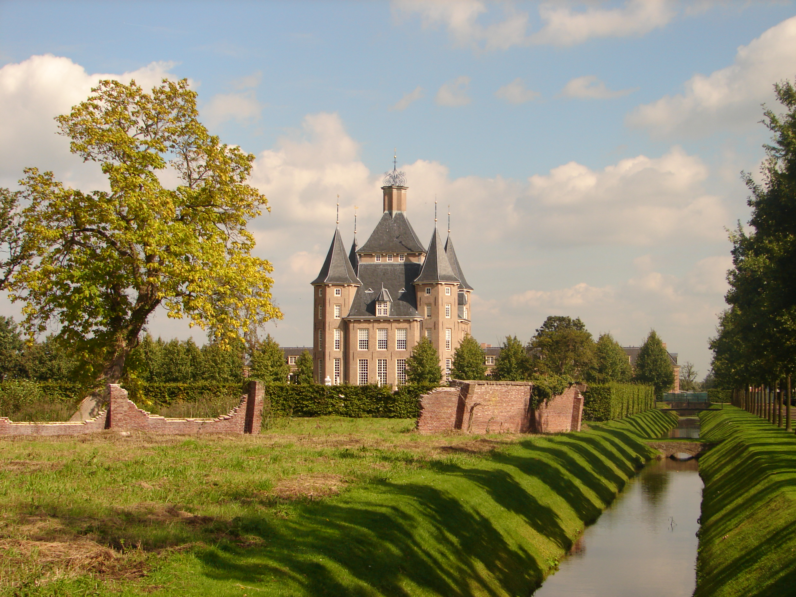 Overzicht van Kasteel Heemstede in zijn omgeving